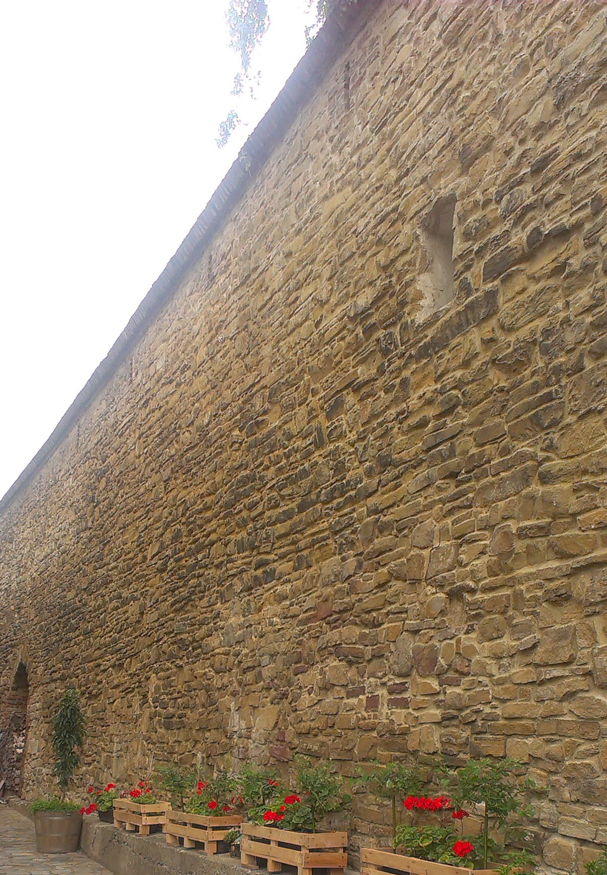 Městské opevnění, Kroměříž.